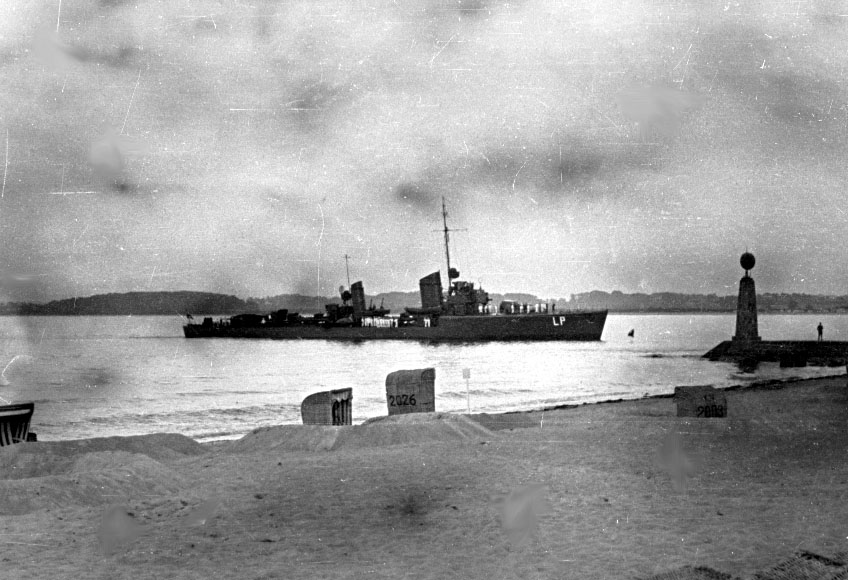 Torpedoboot Leopard (Typ 24) im Juni 1934 bei Neustadt/Holstein.